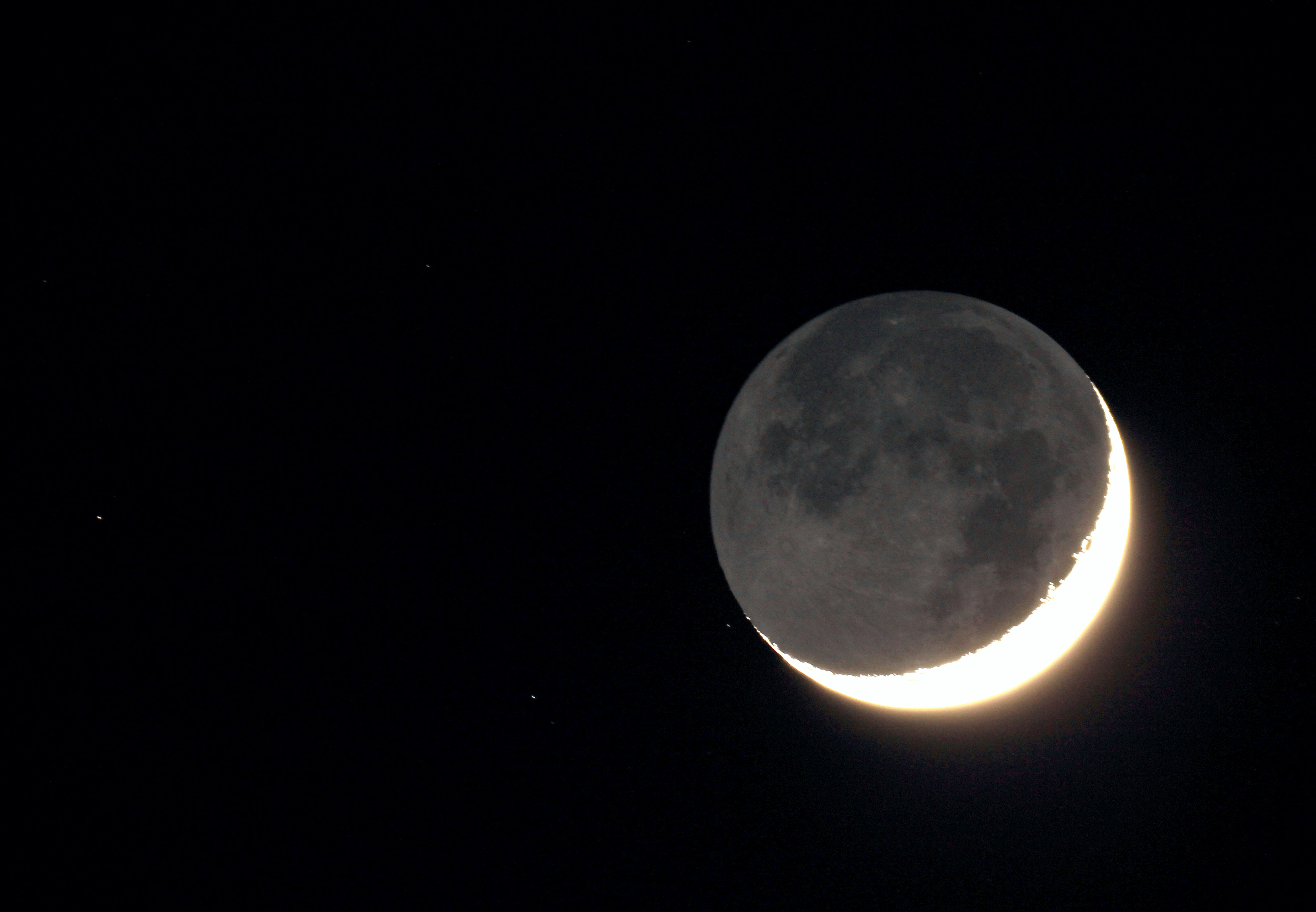 lumiere cendrée